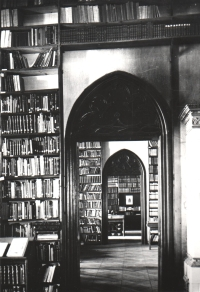 Slovanská knihovna sídlila do roku 1929 v Místodržitelském letohrádku